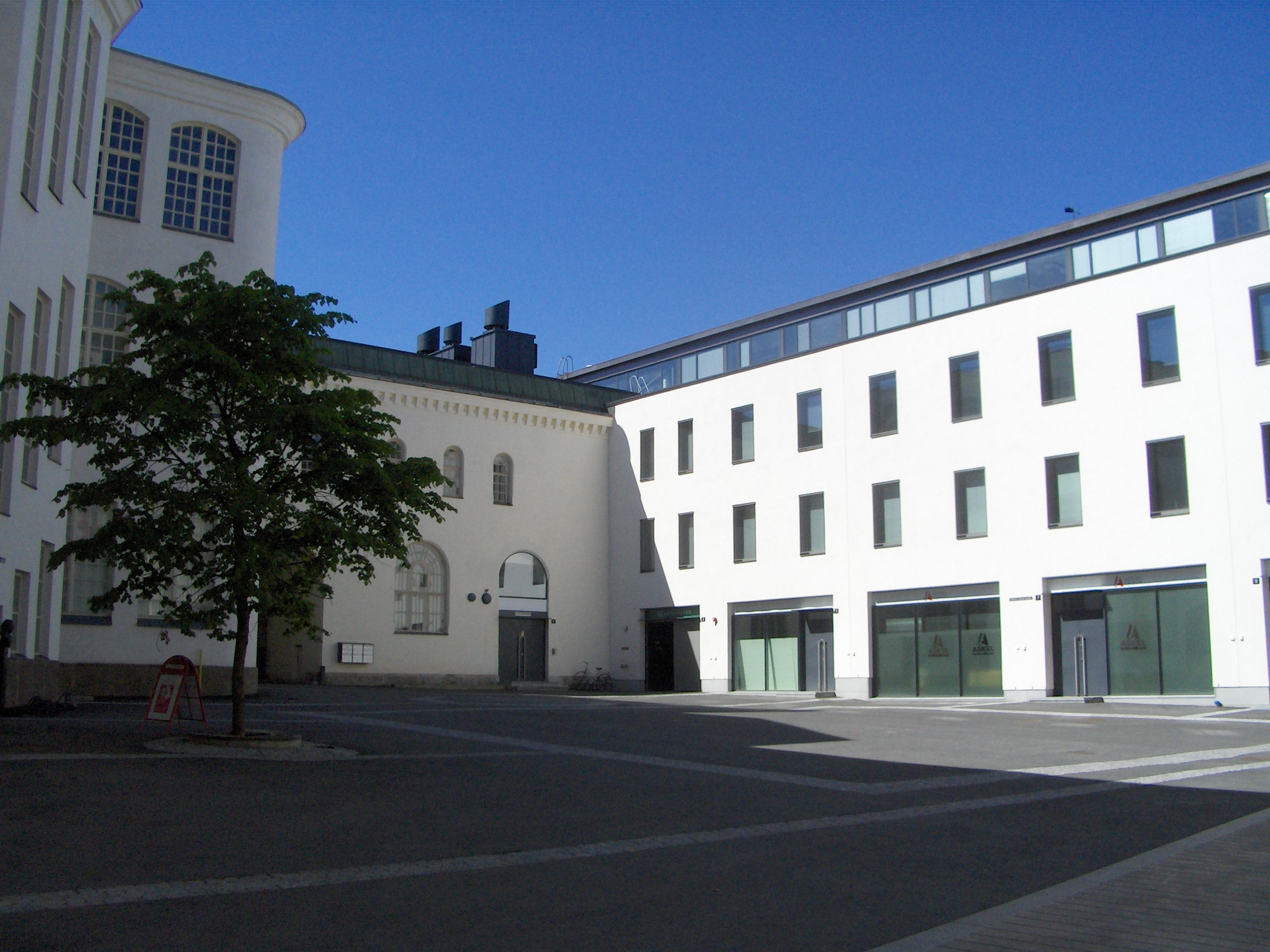 Väinö Linnan aukio, Tampere